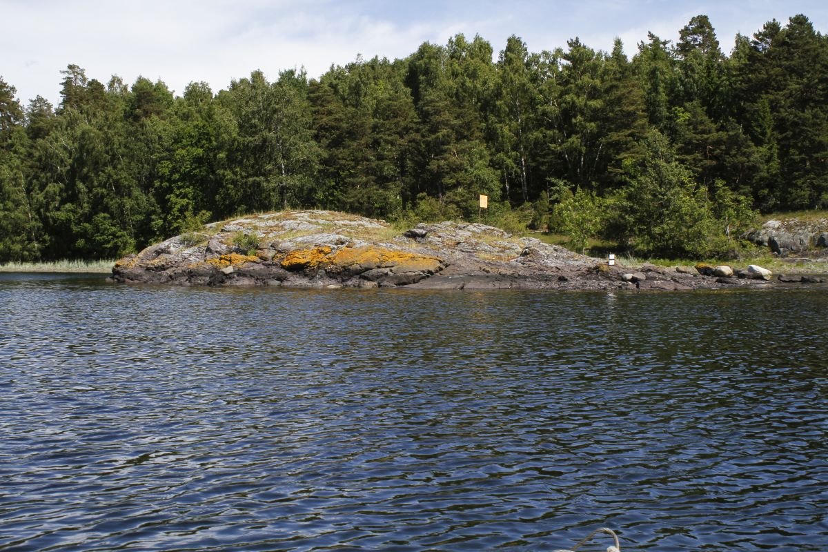 Østøyskjæret ligger i Hortens indre havnebasseng.